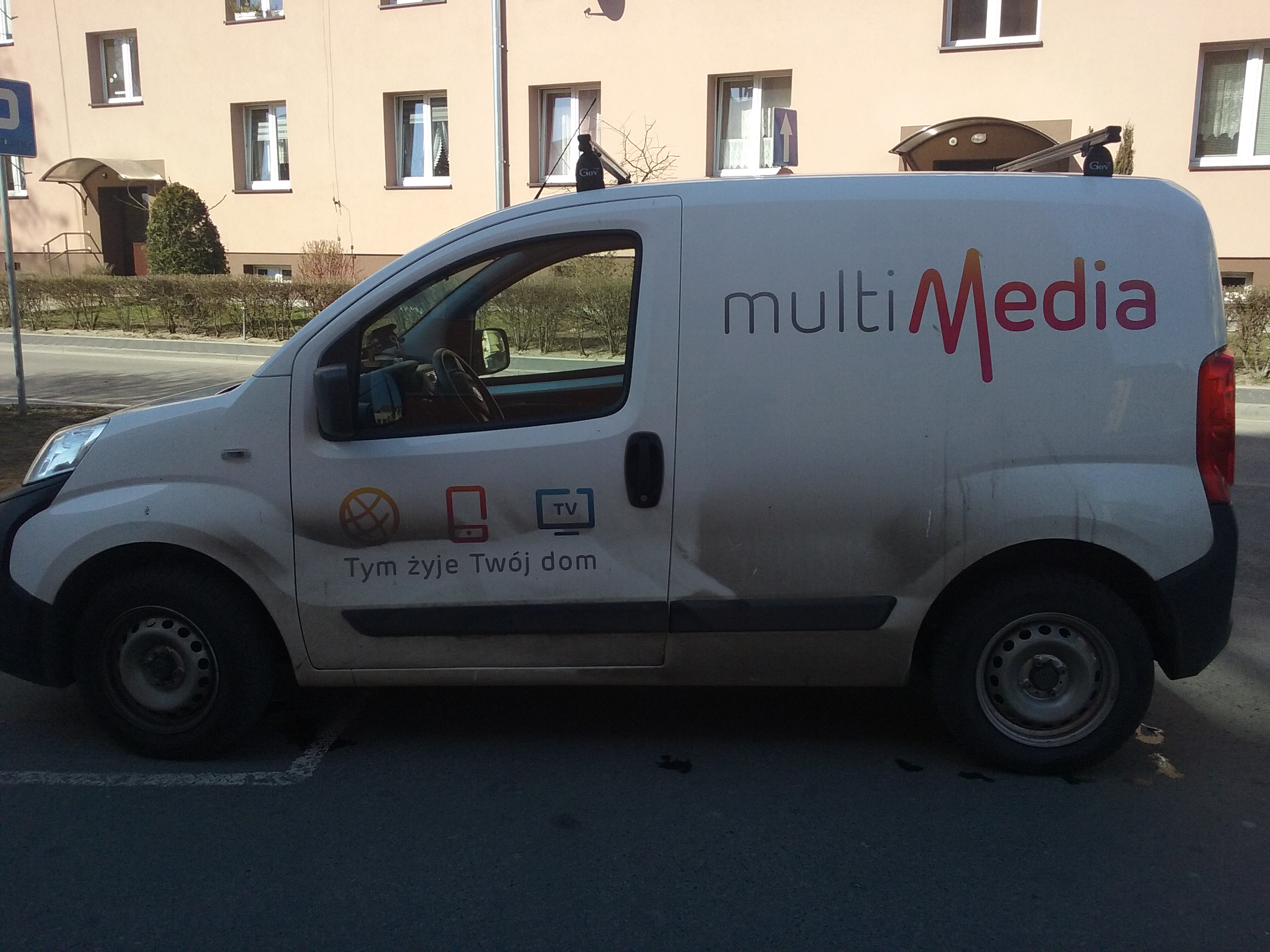 Samochód techników multiMedia Polska w 60-tysięcznym Tomaszowie Mazowieckim, województwo łódzkie, PL,EU,CC0